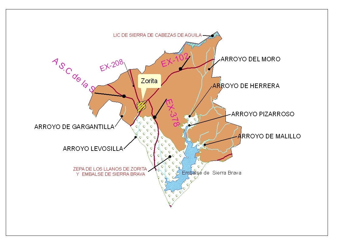 Ubicacion